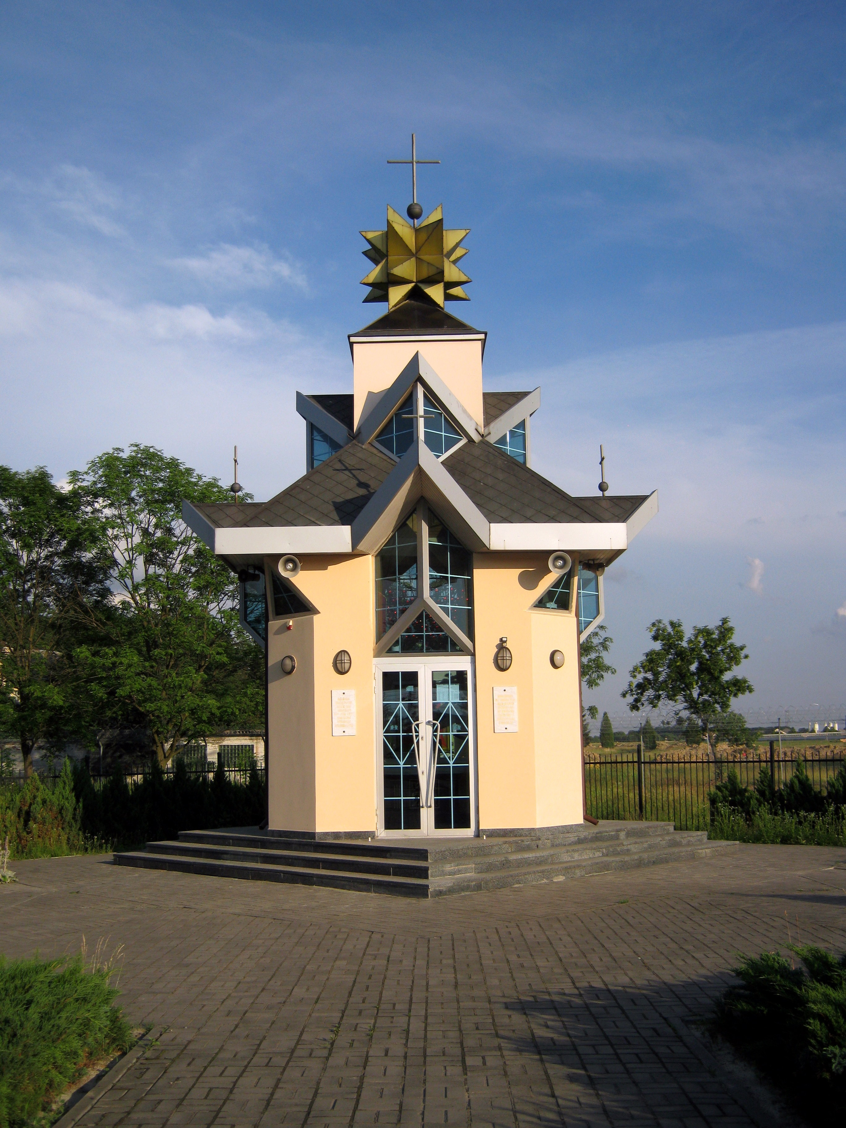 Каплиця всіх Святих українського народу і жертв Скнилівської трагедії (вул. Авіаційна, місто Львів). Каплиця споруджена ЛМГО "Скнилівська трагедія" коштом благодійників і жертводавців з усього світу до першої річниці кривавого авіашоу на Скнилівському летовищі 27 липня 2002 року